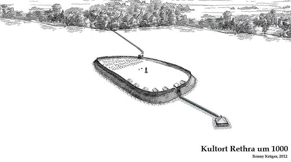 Mögliches Aussehen der Kultburg